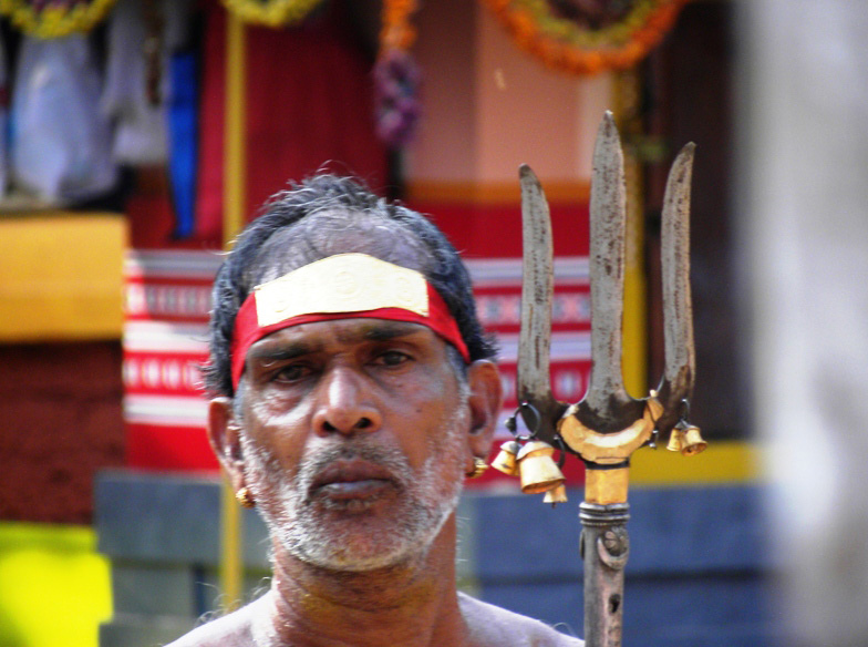 അമ്പലത്തിലെ വെളിച്ചപ്പാട്